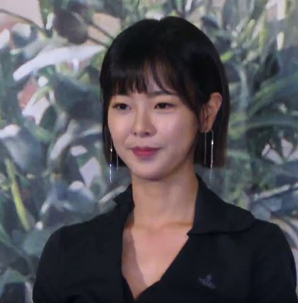 2일 오후 서울시 영등포구 여의도 콘래드 호텔에서 KBS 2TV 수목드라마 '당신의 하우스 헬퍼'의 제작발표회가 열렸다.